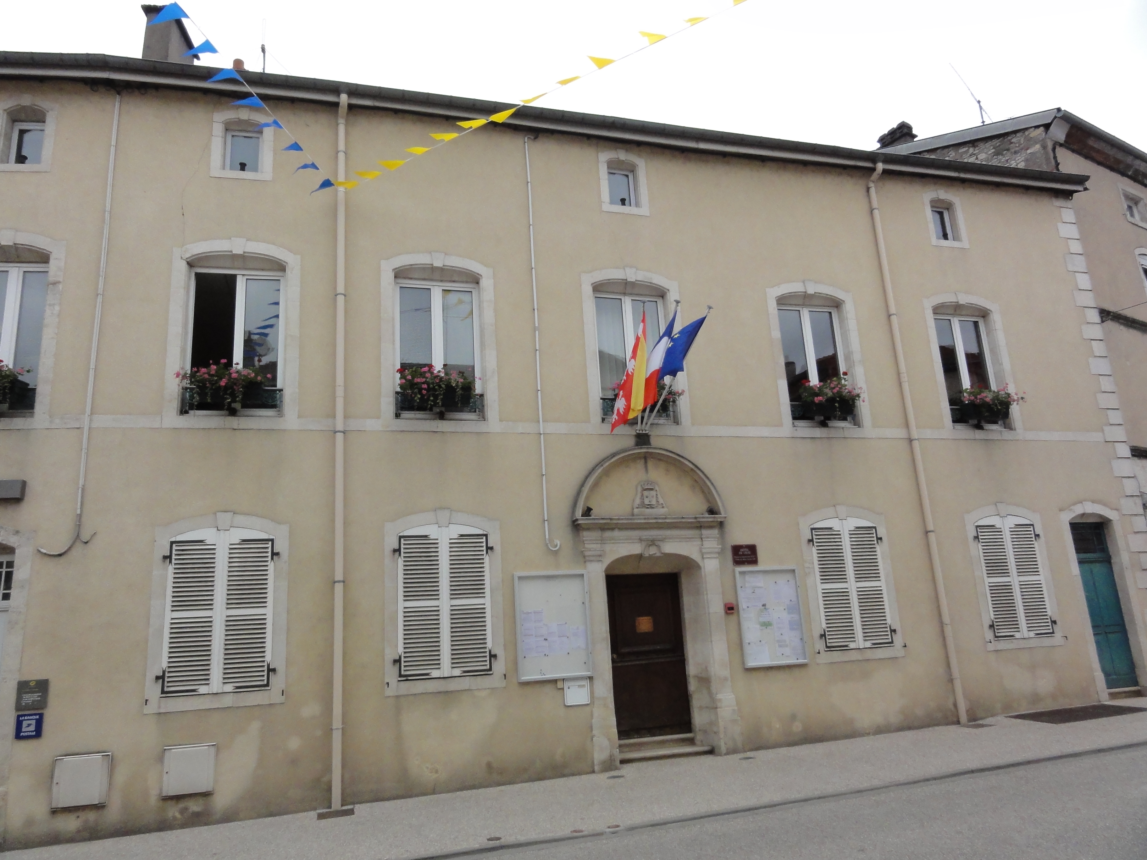 Rosières-aux-Salines (M-et-M) mairie